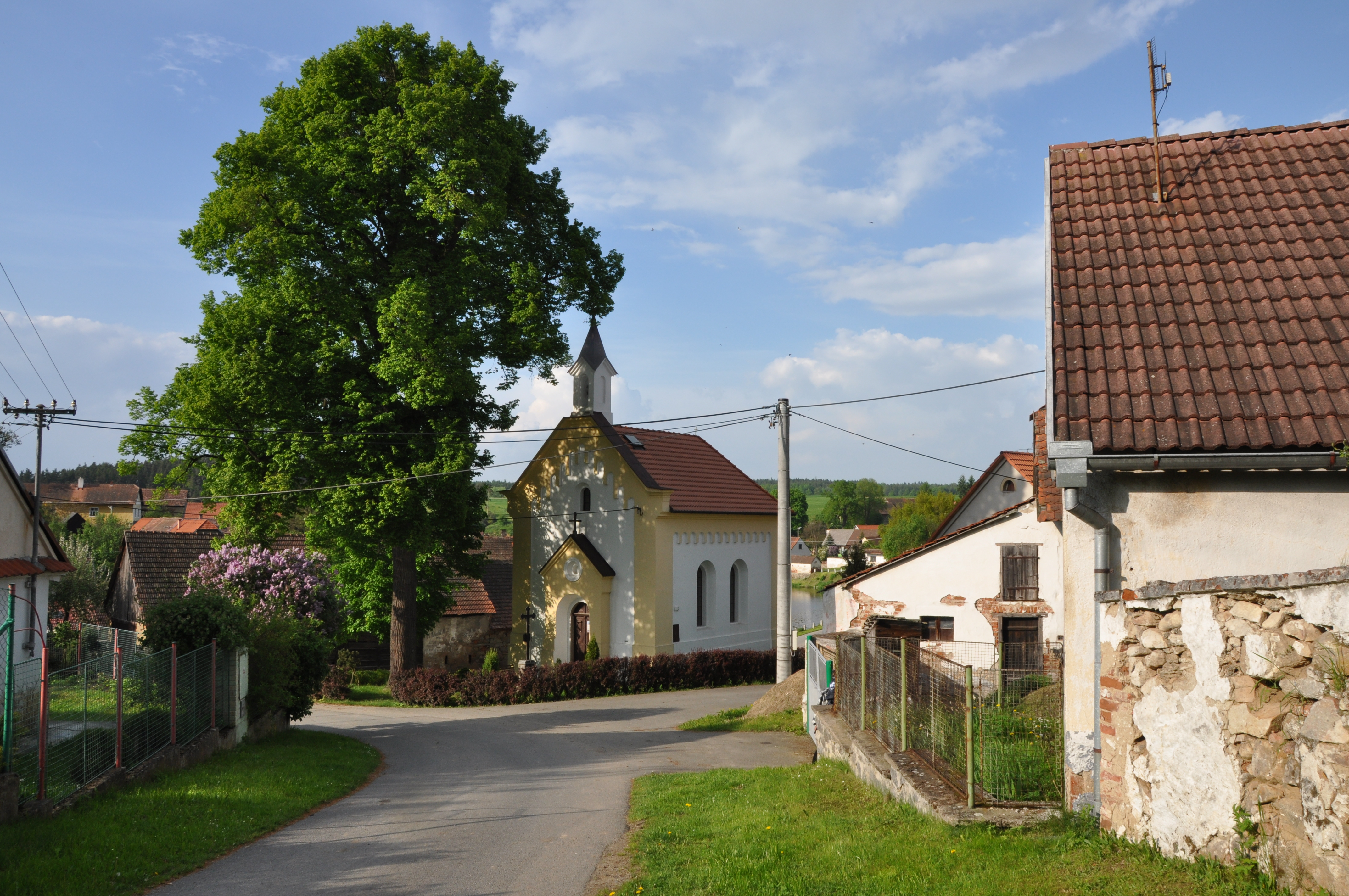 Vesnice Jickovice